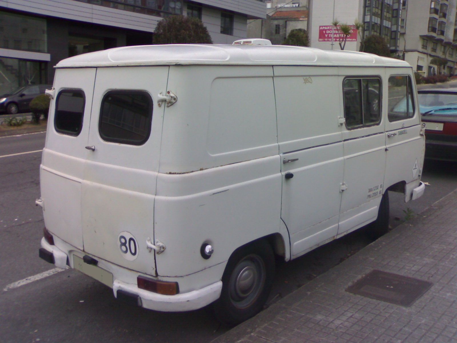 Parte trasera de una furgoneta SAVA-Pegaso J4.